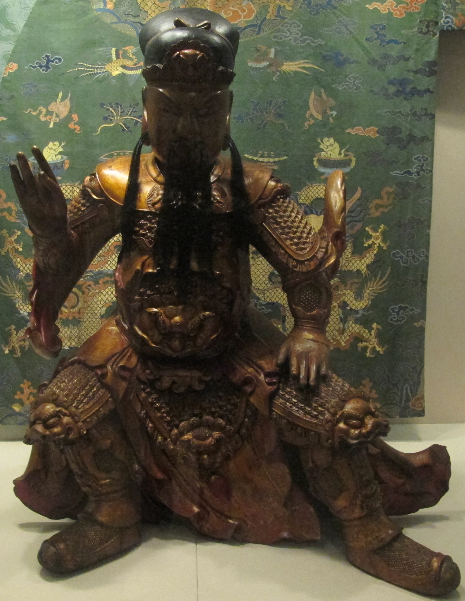 Dinastia qing, guan di, 1640-1700